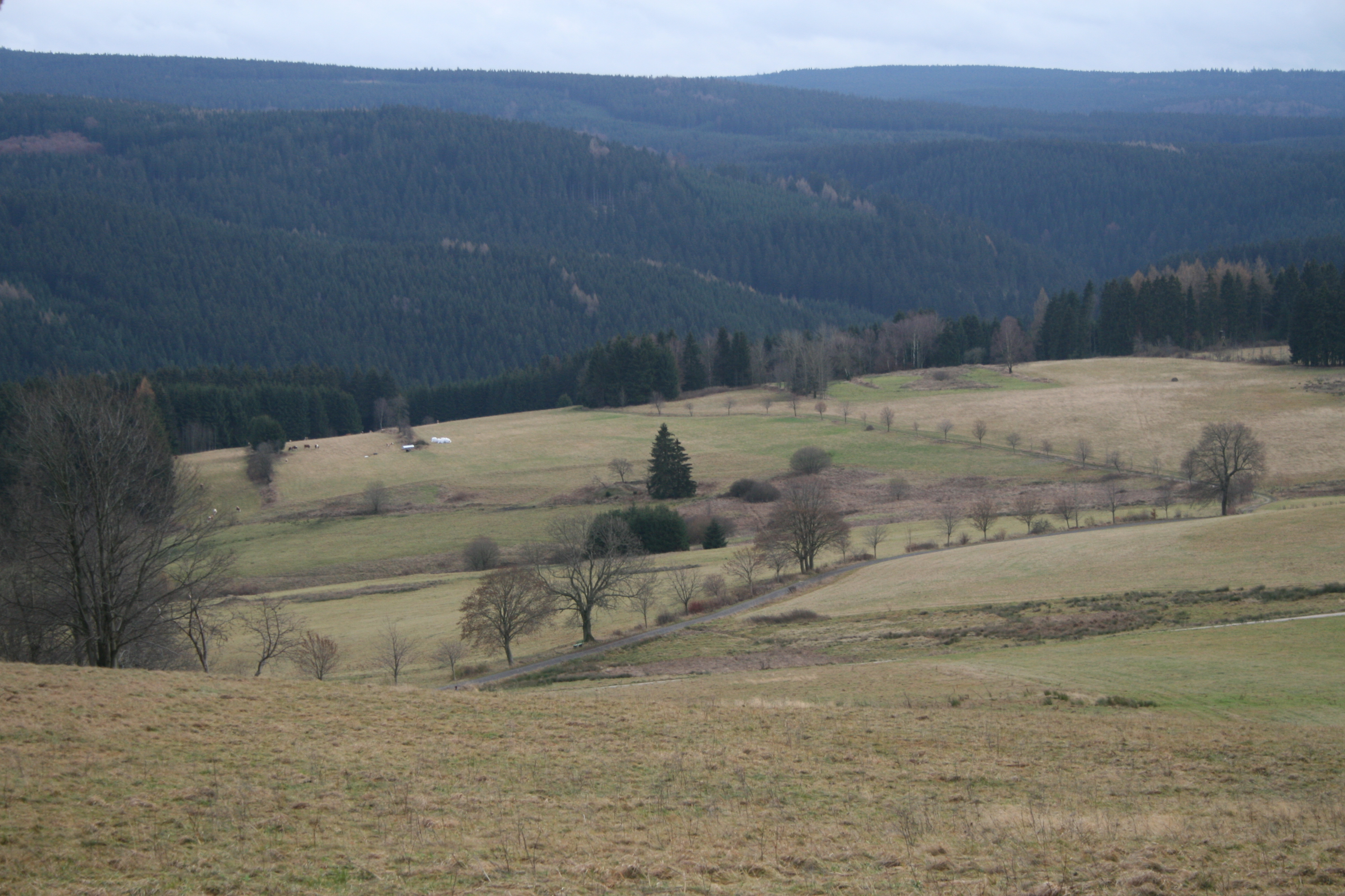 Blick vom Knock nach Süden: Die herbstlichen Bergwiesen prägen das Bild. Hinter dem Tal, in dem die Zwickauer Mulde fließt, der Wald - bis zum Erzgebirgskamm an der tschechischen Grenze.